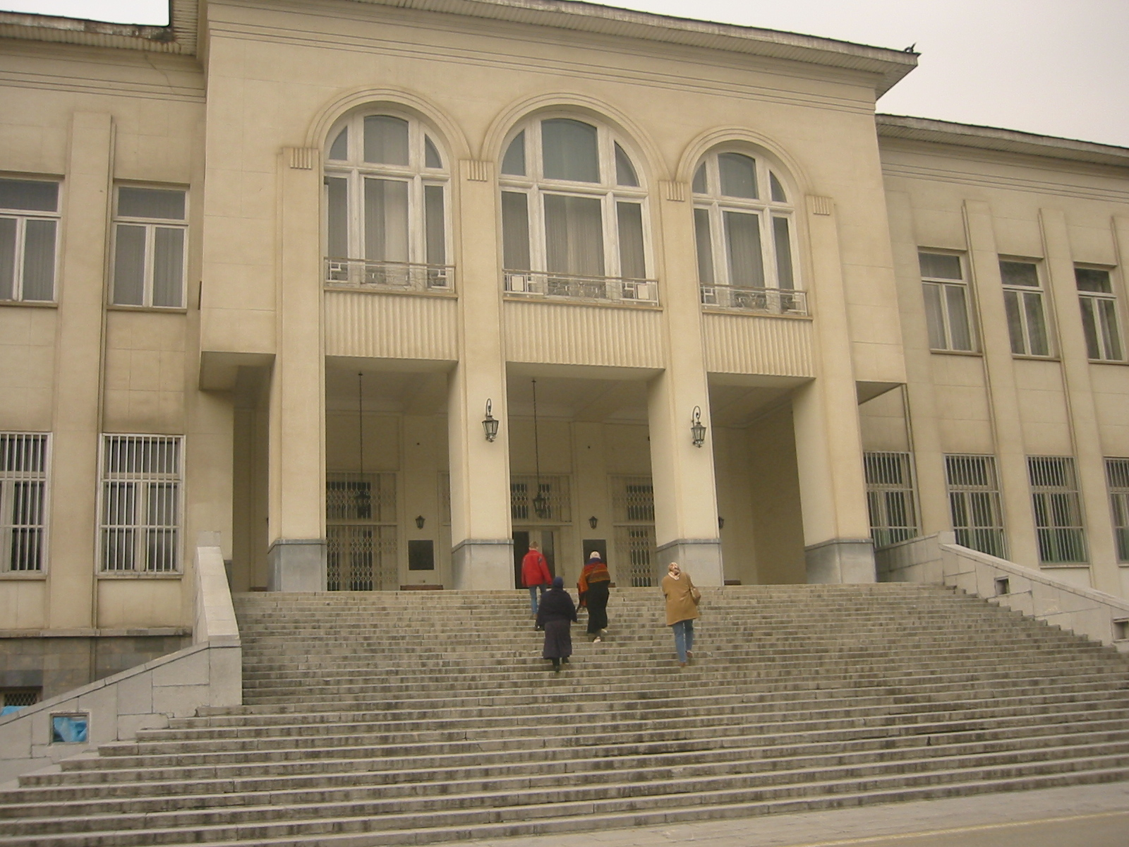 Het "witte paleis" van sjah Mohammed Reza Pahlavi in Teheran.